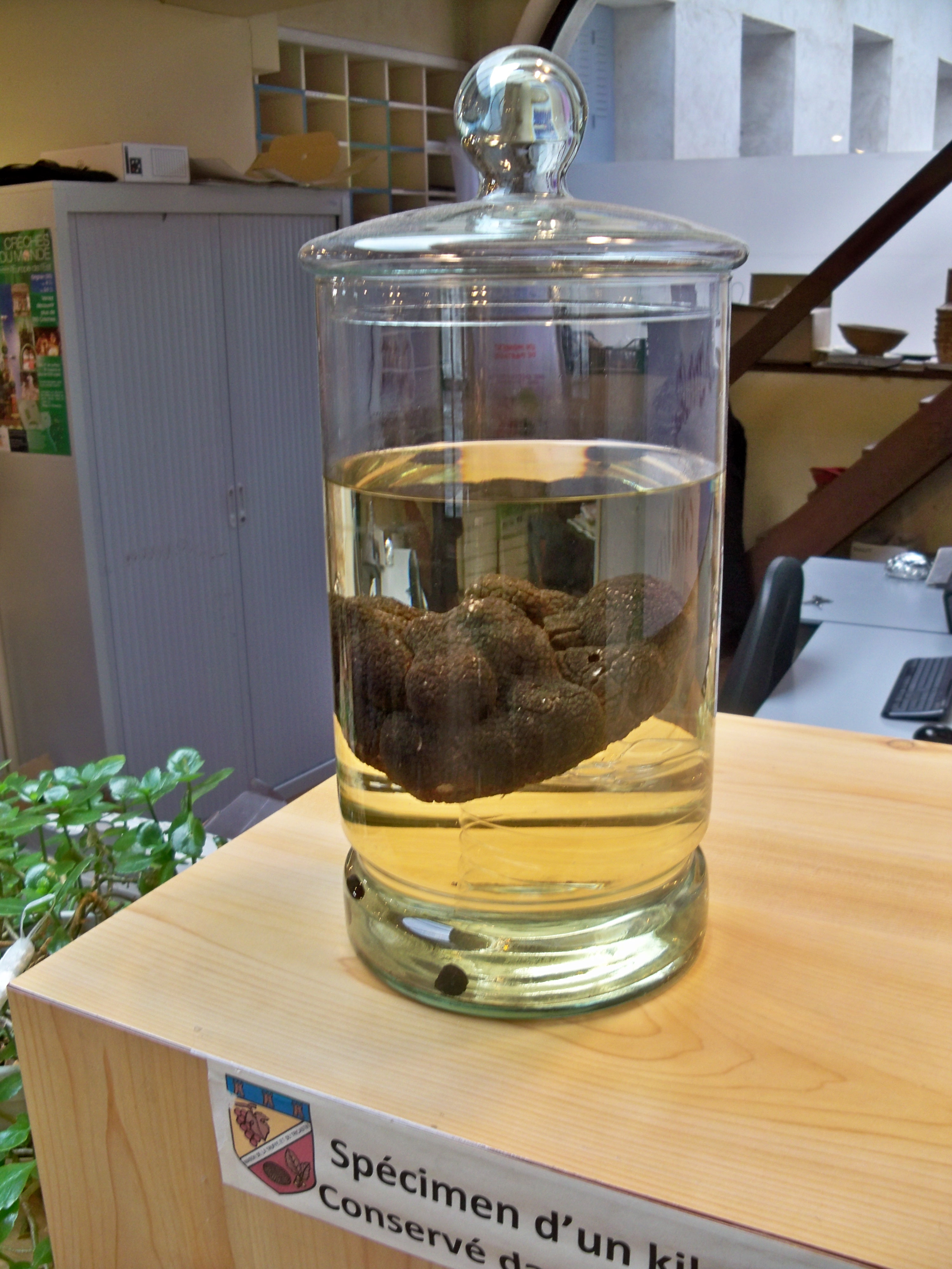 Maison de la Truffe de Saint Paul Trois Chateaux (26)